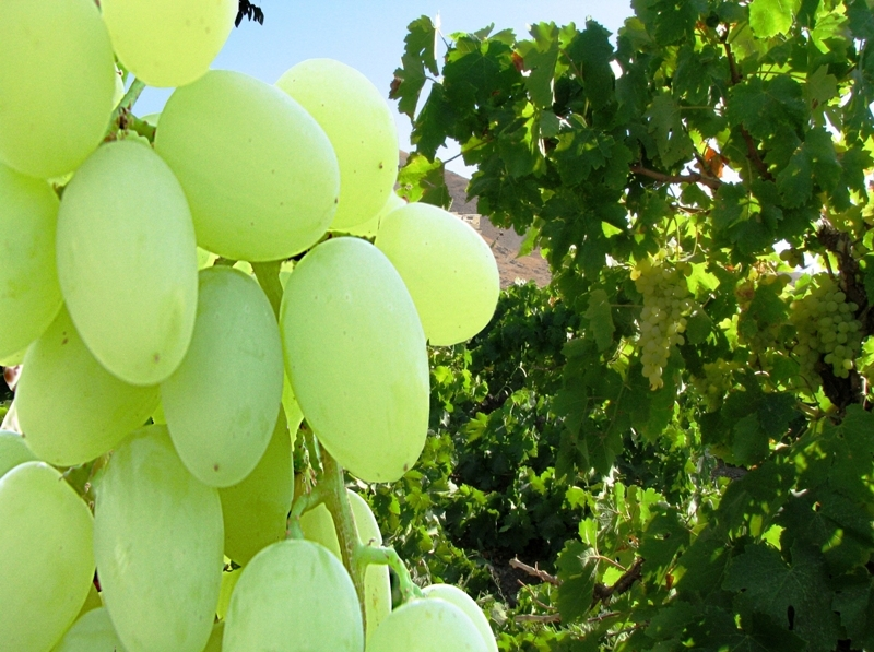 انگور عسگری